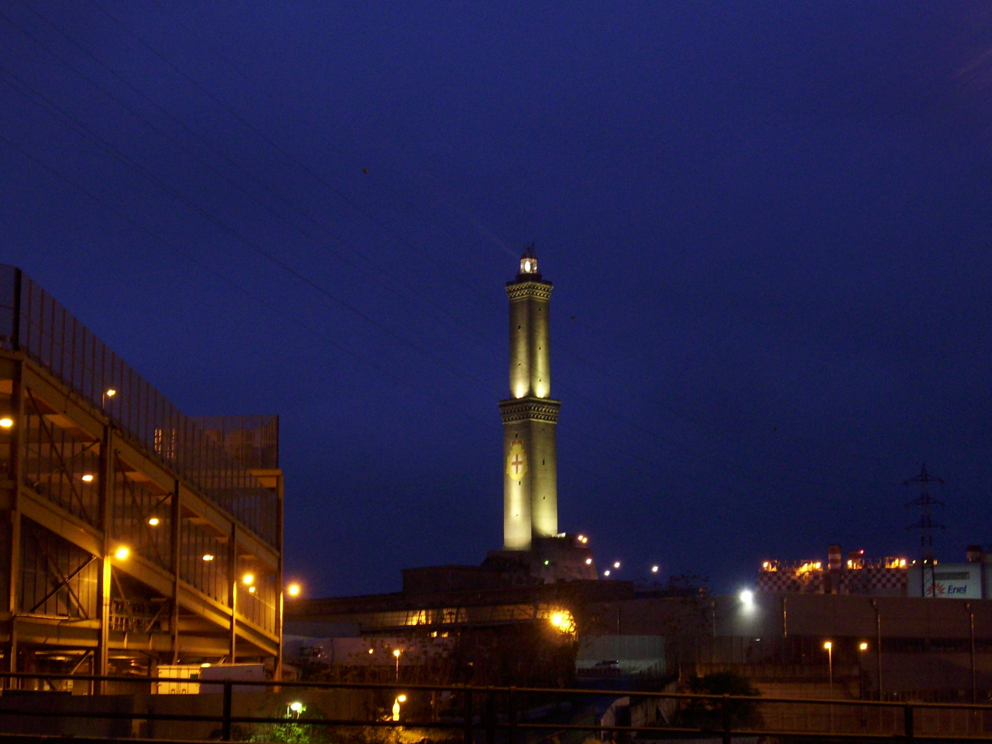 La torre della Lantarna di Genova, poco prima dell'alba